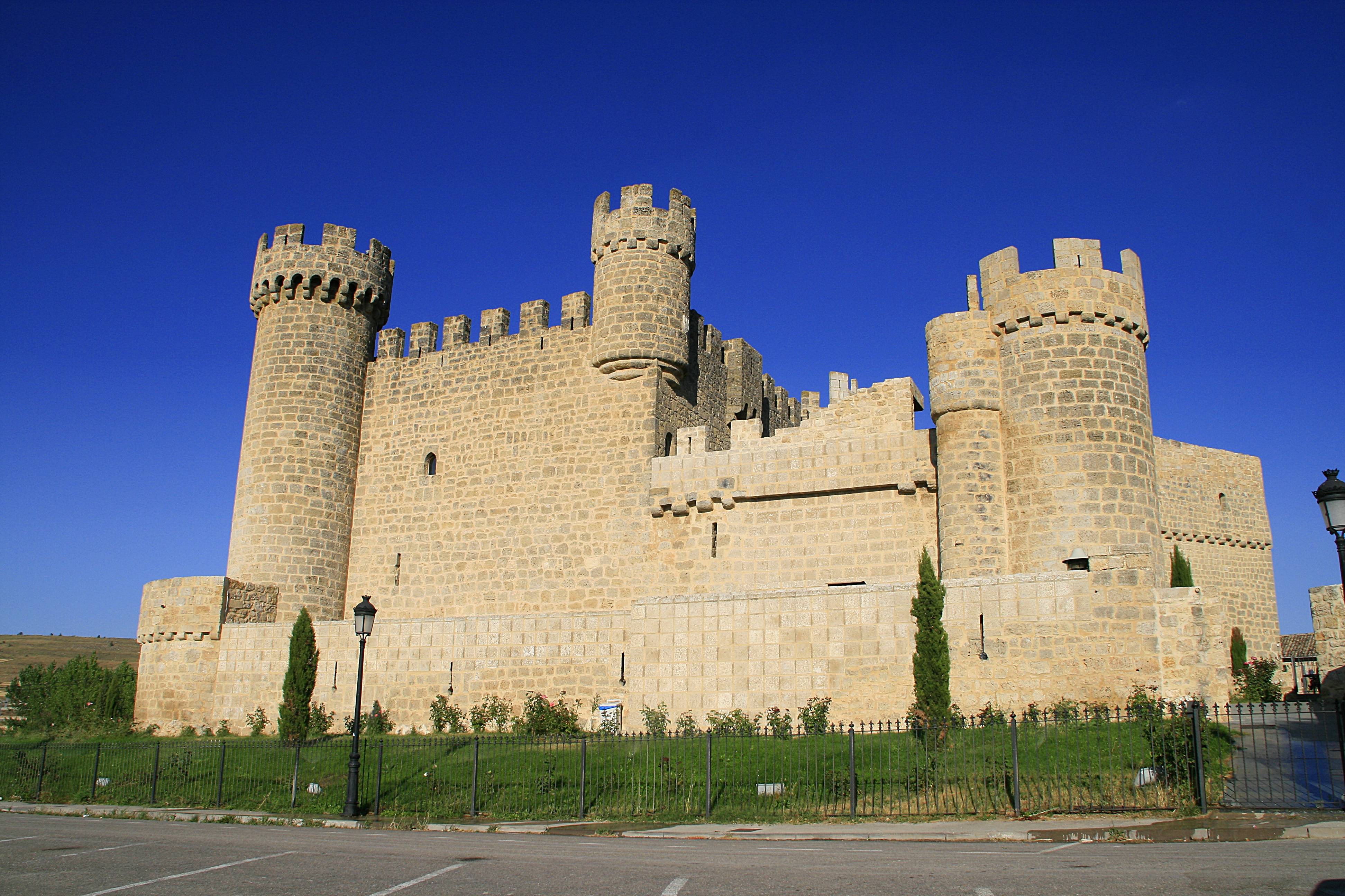 El castillo de Olmillos de Sasamón de Los Cartagena se encuentra en la localidad de Olmillos de Sasamón, en el término municipal de Sasamón, provincia de Burgos. See also: Castles in Spain and Castle.